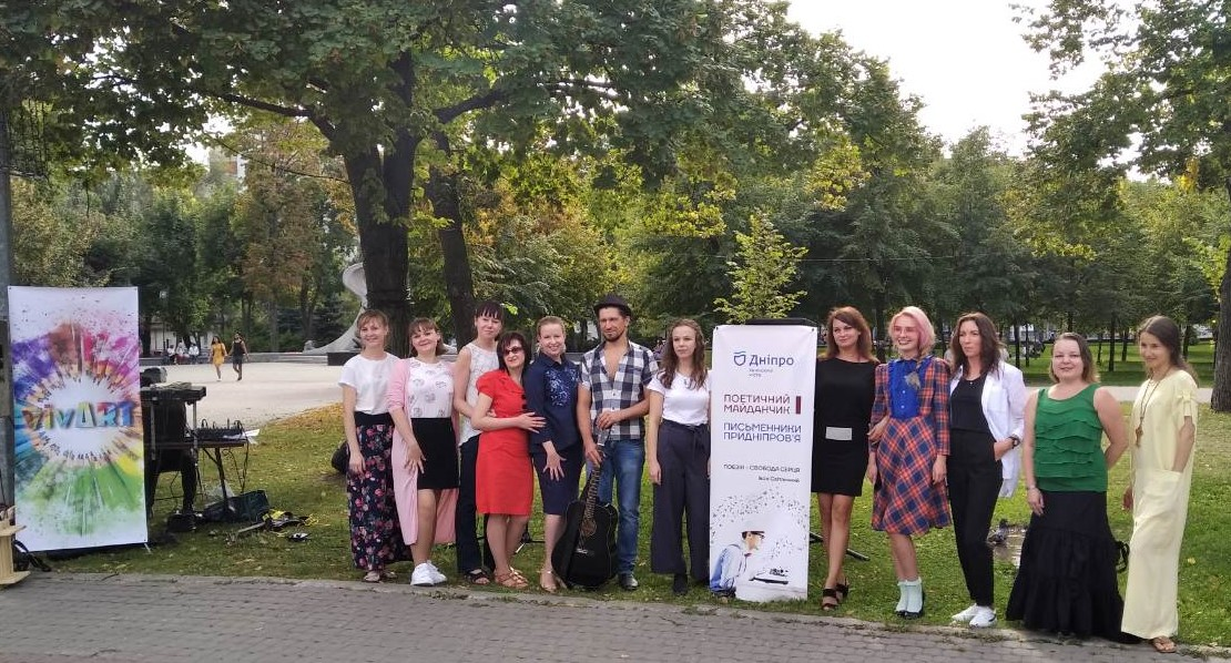 Клуб VivArt у парку в Дніпрі, 2019 рік